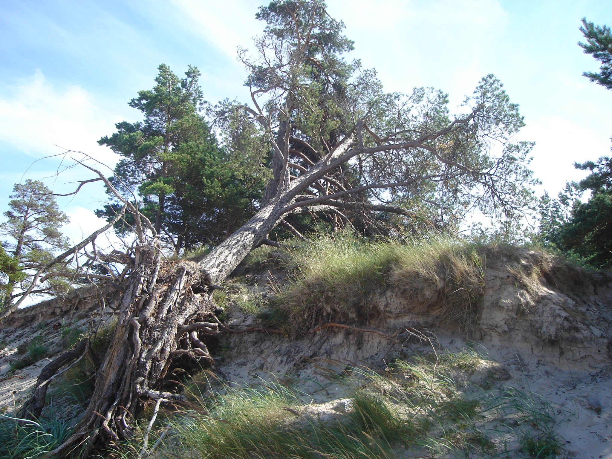 Nokritis koks